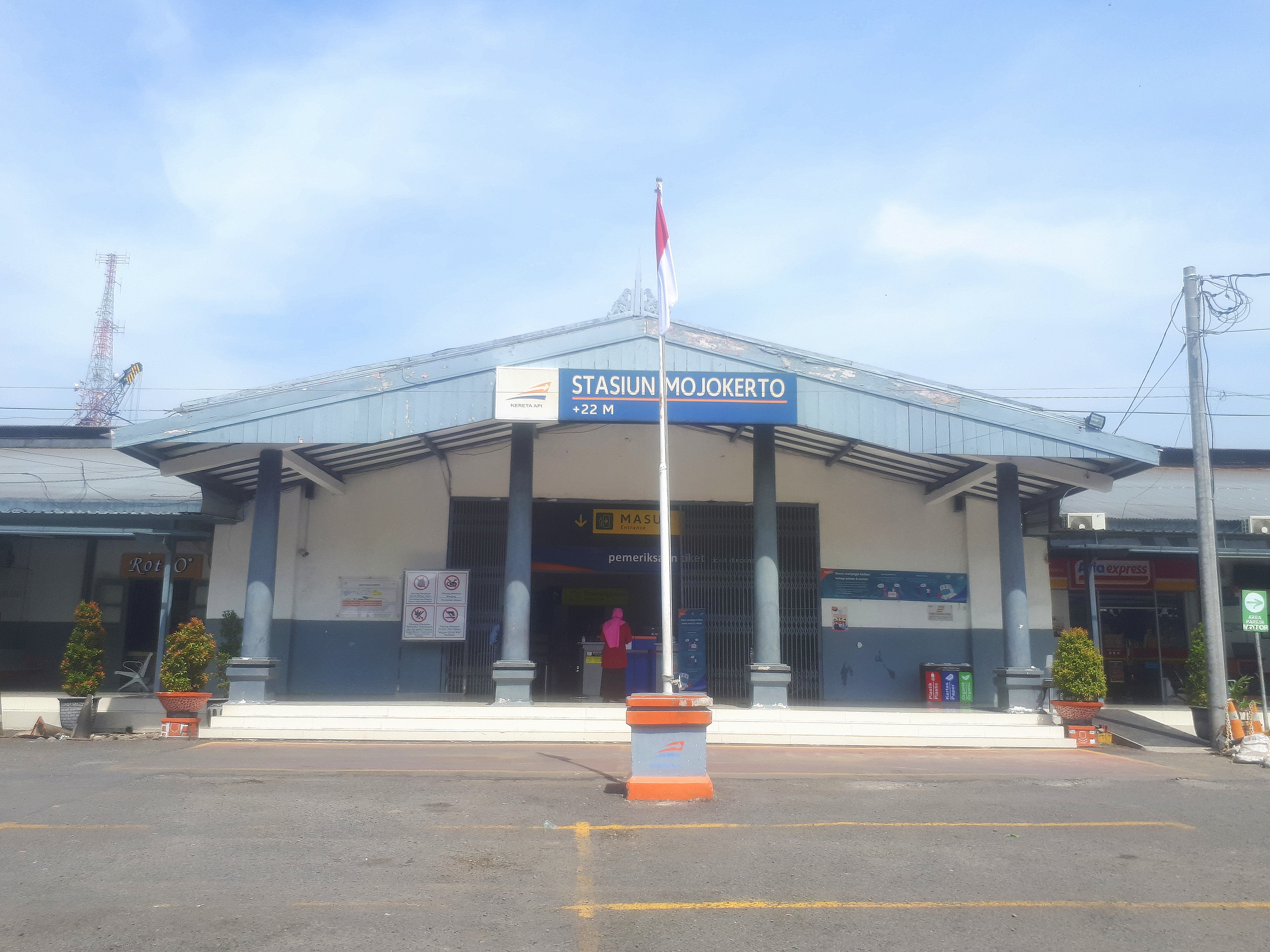 Tampak depan Stasiun Mojokerto, 2020